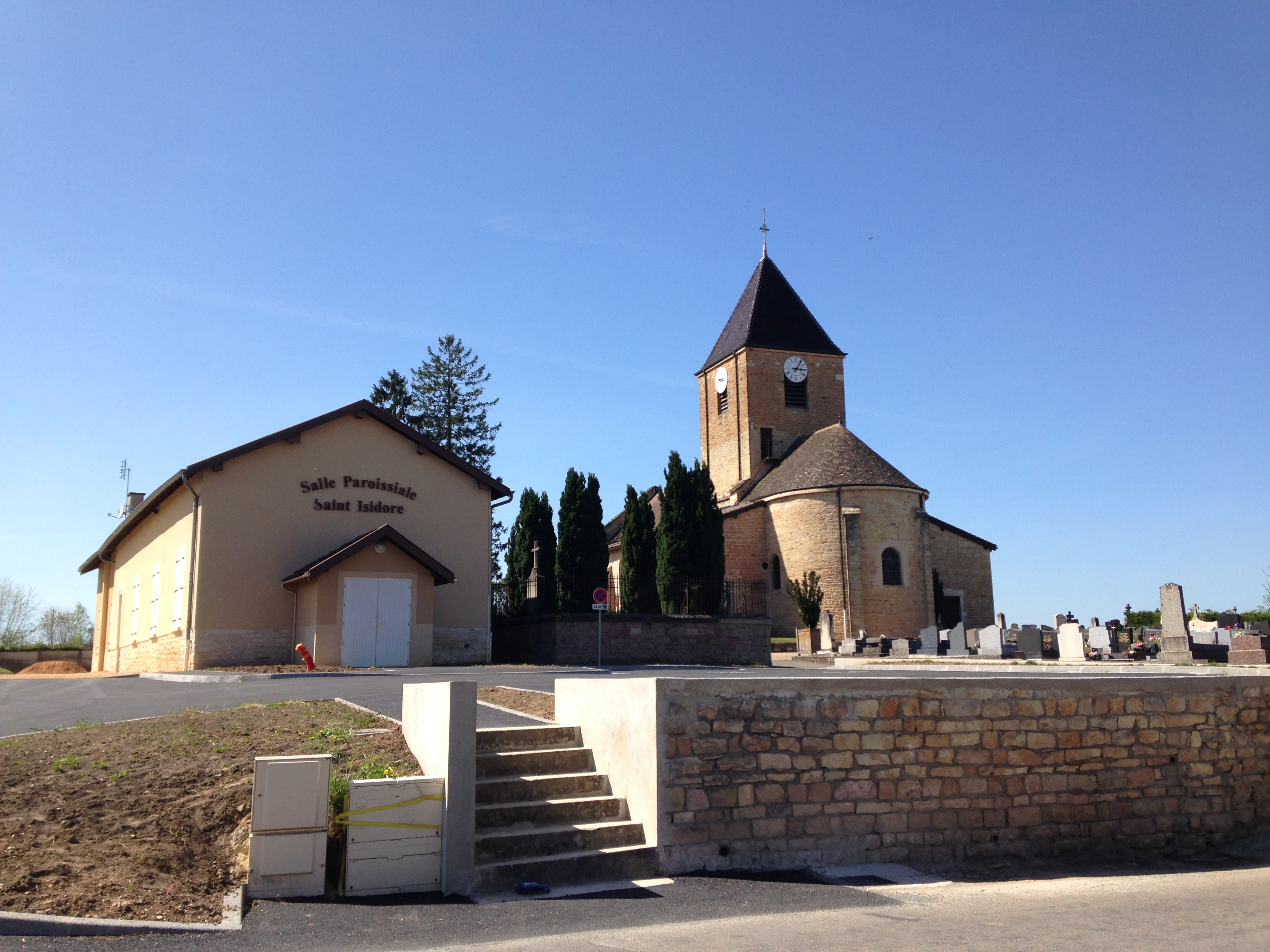 Vue de l'église de Replonges